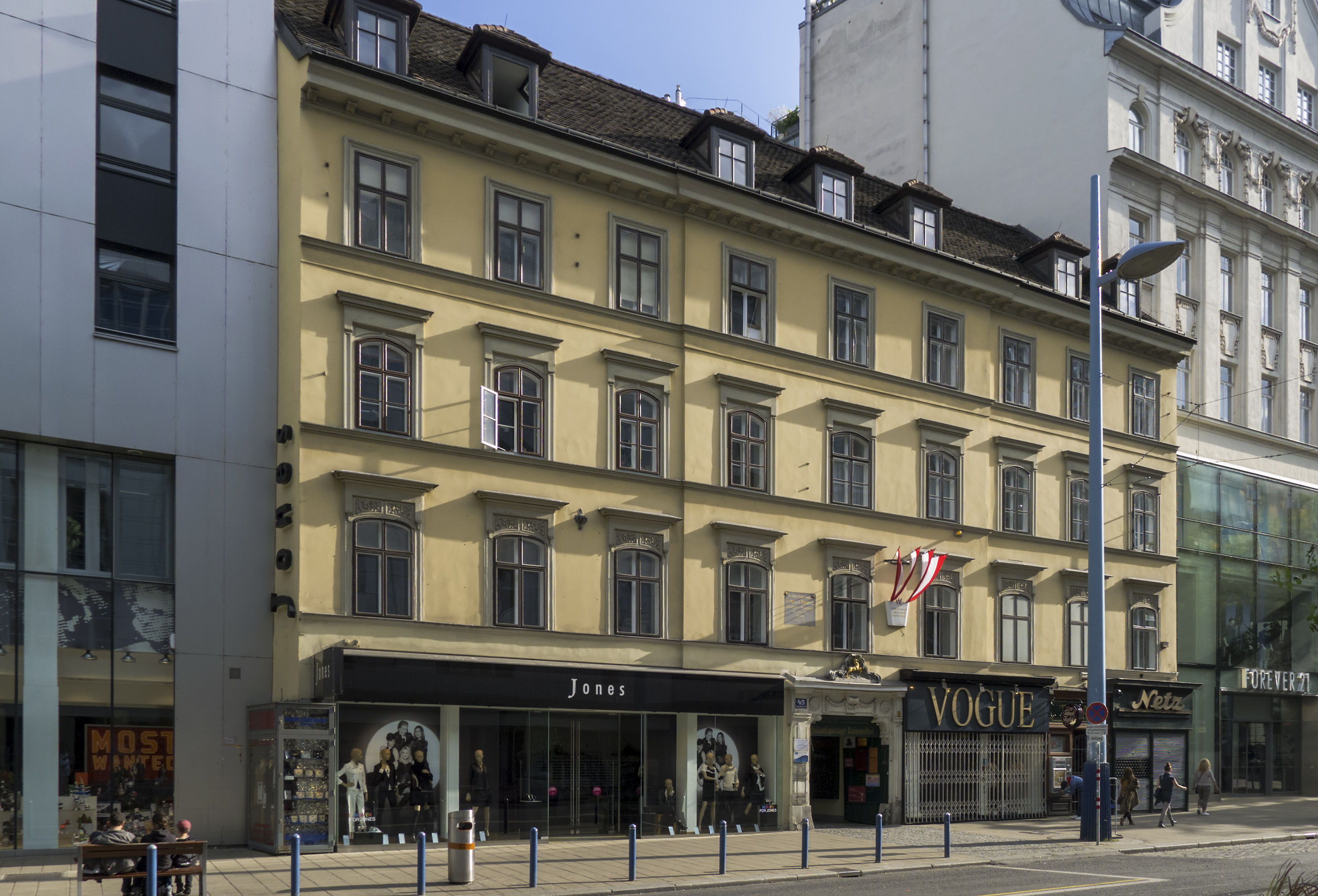 Mariahilfer Straße in Wien 6 bei Nr. 45 (Raimundhof)